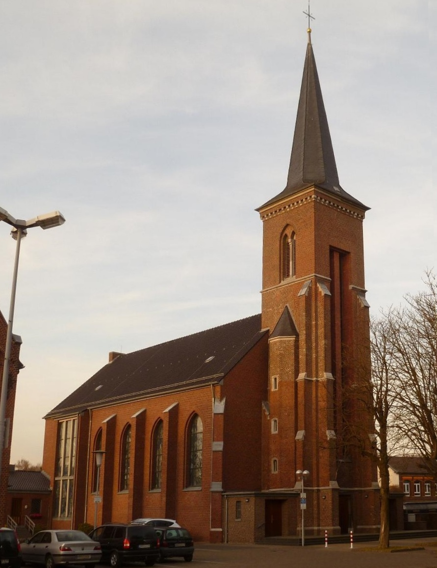 Pfarrkirche St. Mariä Empfängnis, Alsdorf-Mariadorf